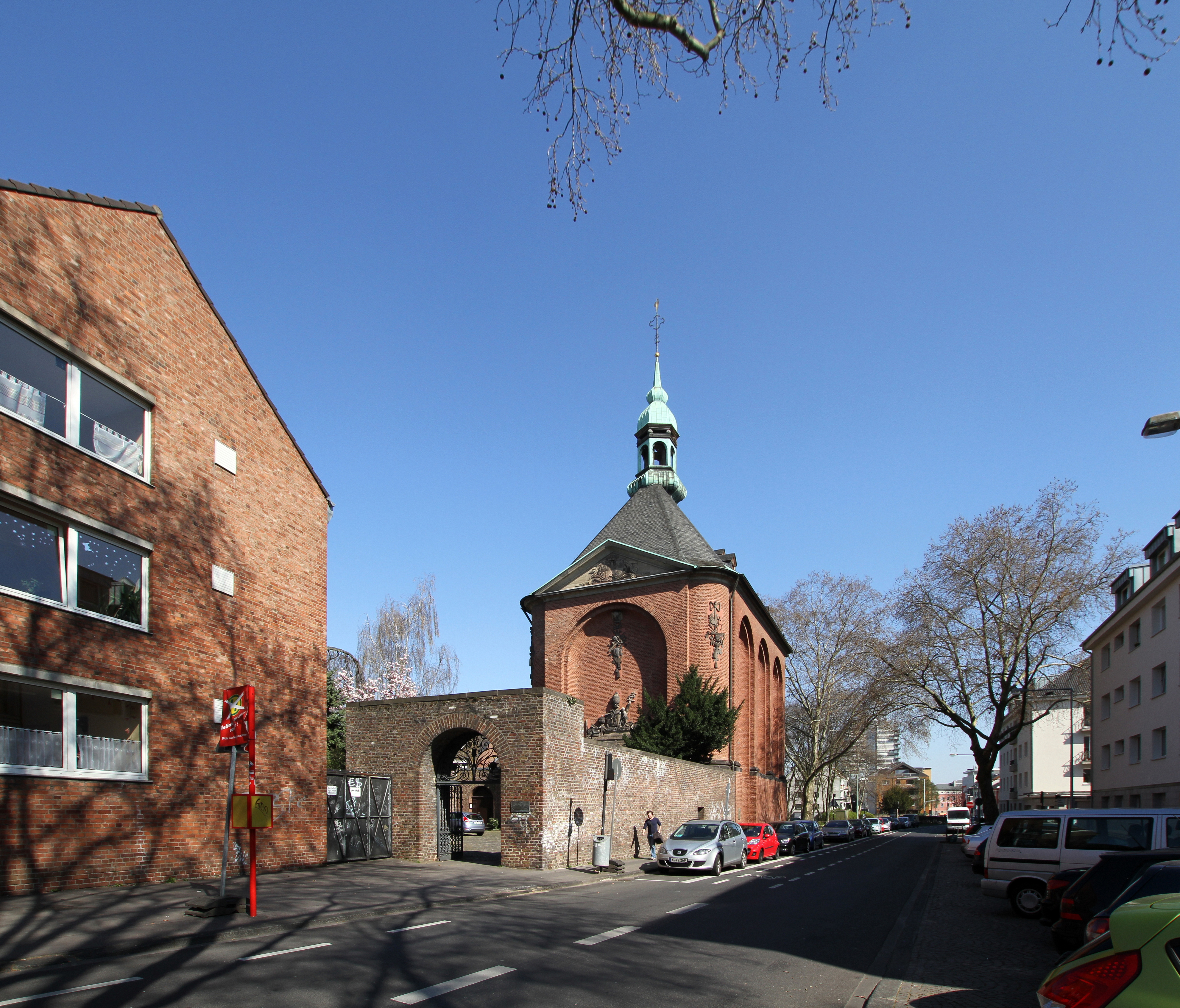 Köln, St. Gregorius oder Elendskirche